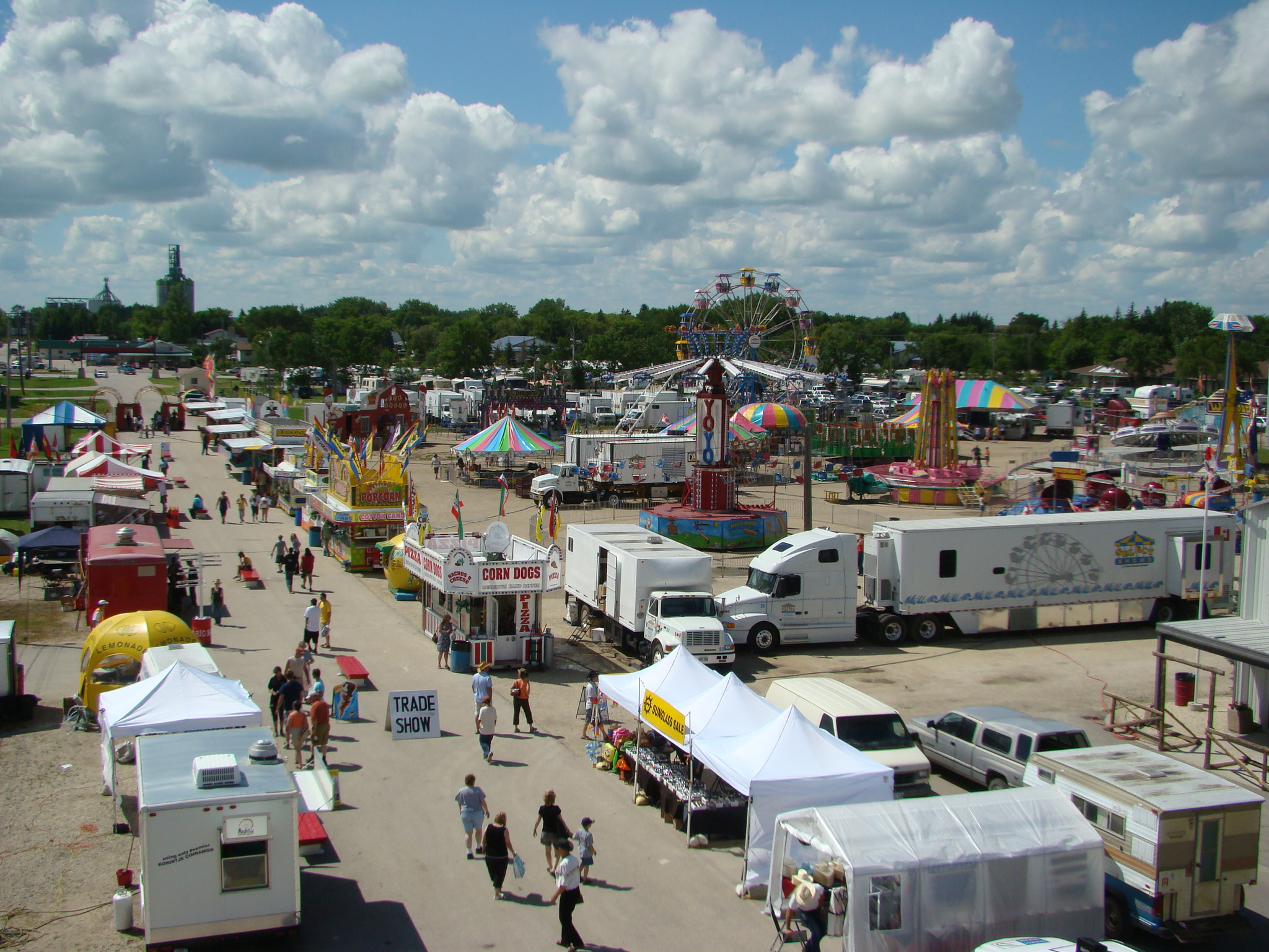 Manitoba Stampede 2008 Morris Manitoba Canada